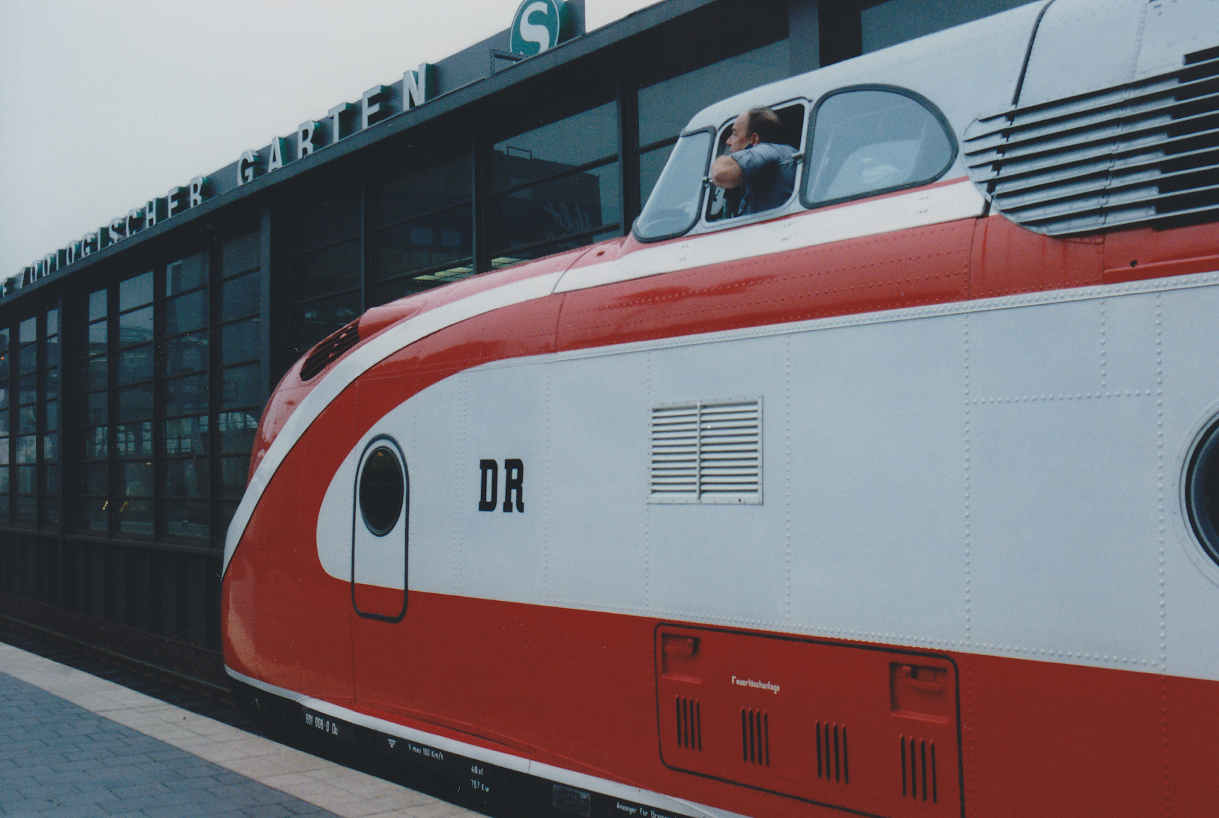 Nur für kurze Zeit, nämlich vom 27. Juli 1990 bis zum 29. September 1990 verkehrte eine VT11.5-Einheit als Intercity 'Max Liebermann' zwischen Hamburg und Berlin und wurde von der Deutschen Reichsbahn der ehemaligen DDR eingesetzt. Die Aufnahme mit DR-Logo hat daher Seltenheitswert.